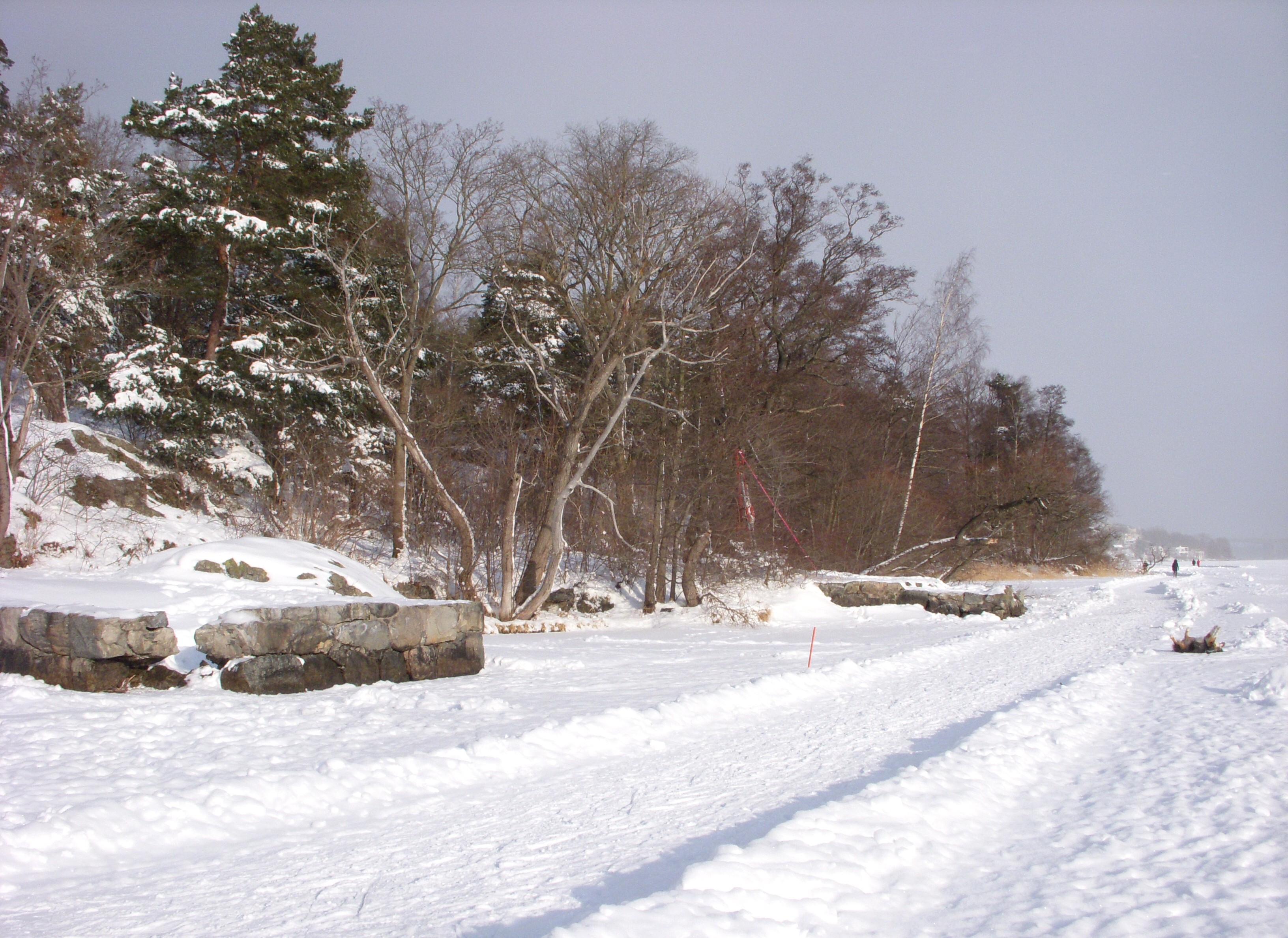 Ålstensskogen från Mälarens is. Den närmaste stenbryggan utgjorde förr fundamentet till ett gult badhus (badsump).